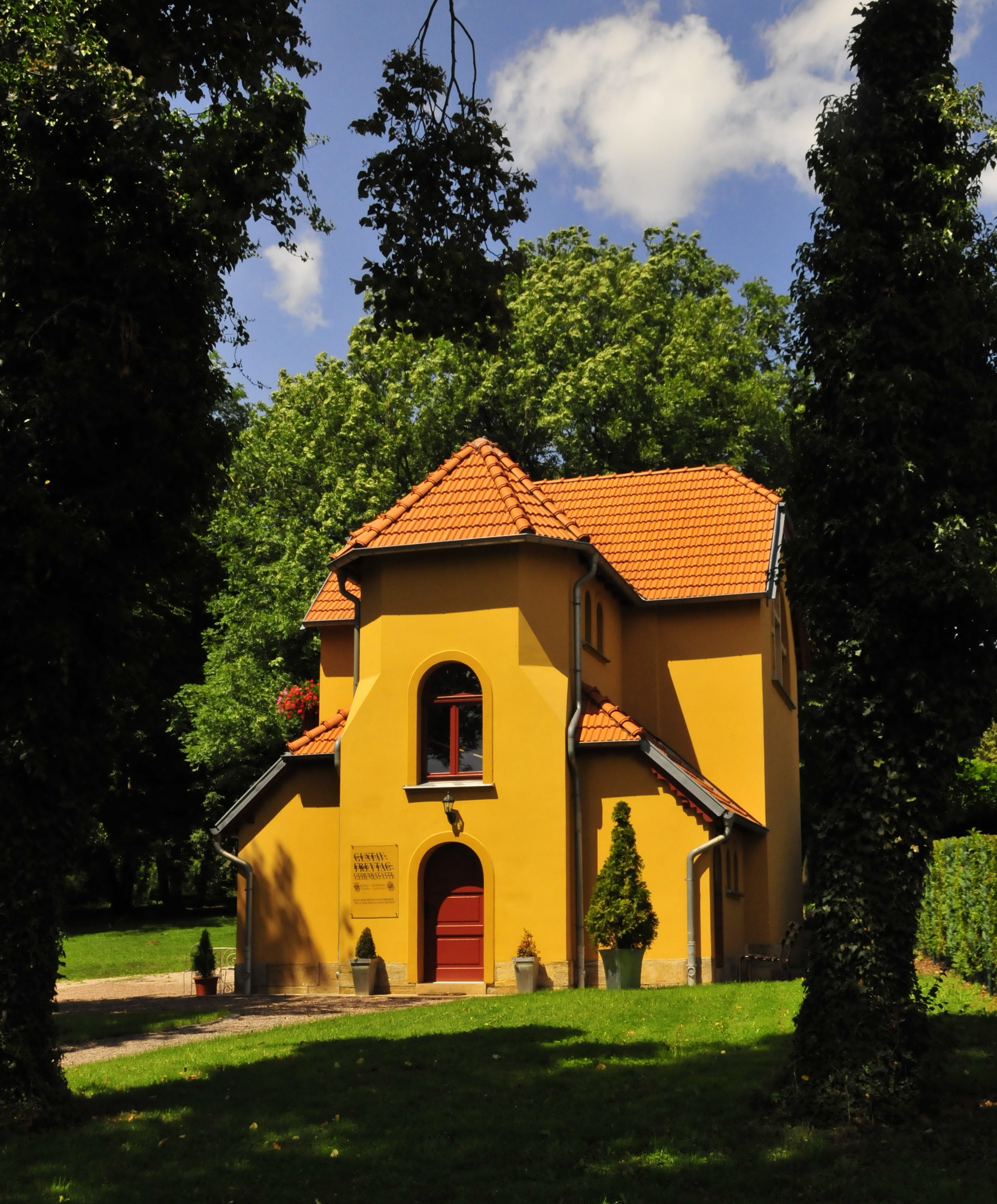 Gustav-Freytag-Gedenkstätte in Siebleben, es ist NICHT das frühere Wohnhaus Gustav Freytags